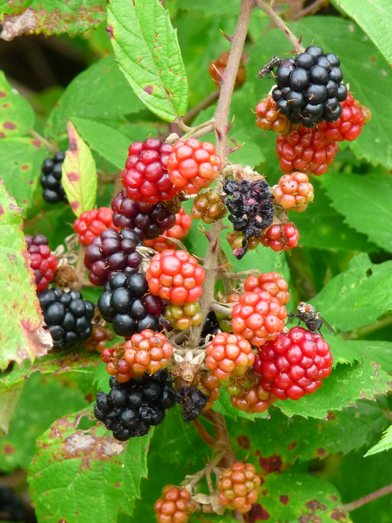 Wilde Brombeeren (Rubus)